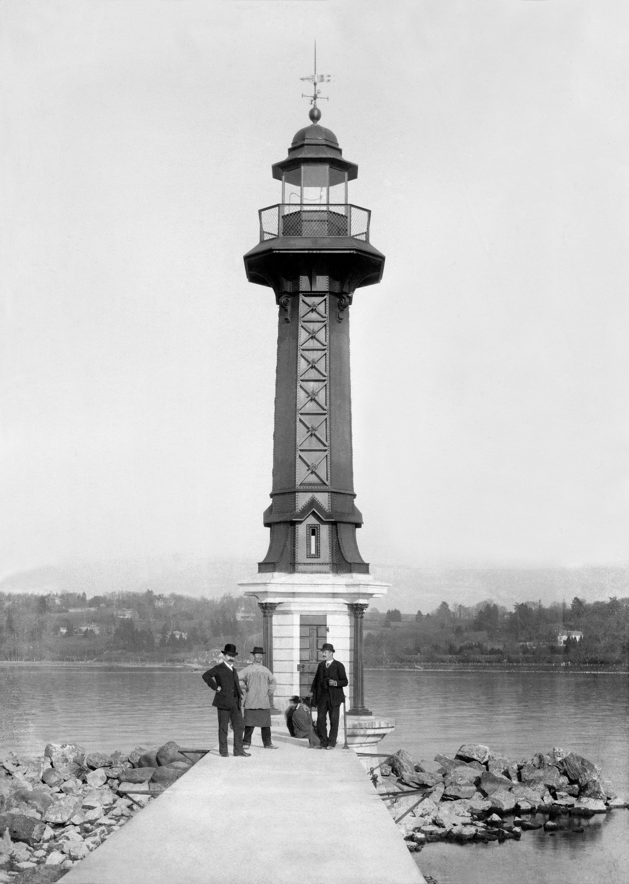 Le phare des Pâquis de 1894. Au centre le gardien François Marc Delrieu.